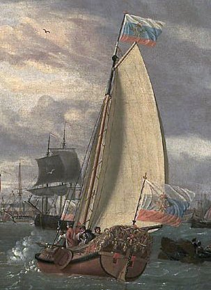 Strug-Boot der Russischen Marine. Ausschnitt aus einem Gemälde von Abraham Storck (1644-1708)